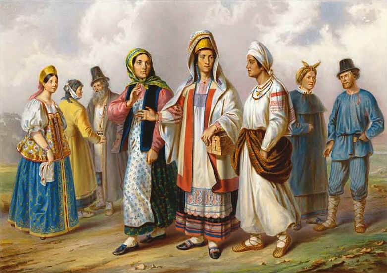 Великороссияне разных губерний. Pauli F.H., "Les Peuples de la Russie", 1862.